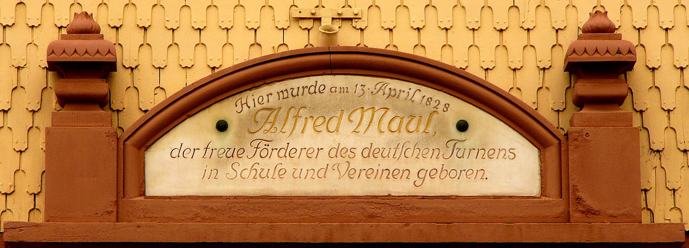 Tafel zum Gedenken an Alfred Maul an seinem Geburtshaus in der Bahnhofstr. 36 in Michelstadt.